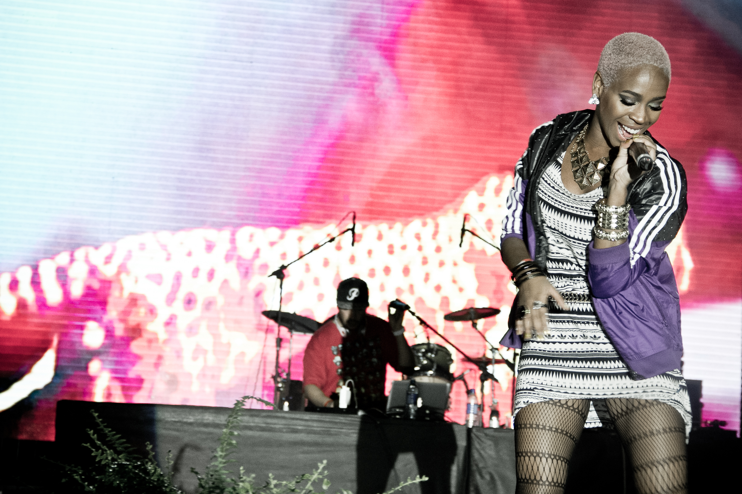 Latinidades – Festival da Mulher Afro Latino Americana e Caribenha 2013